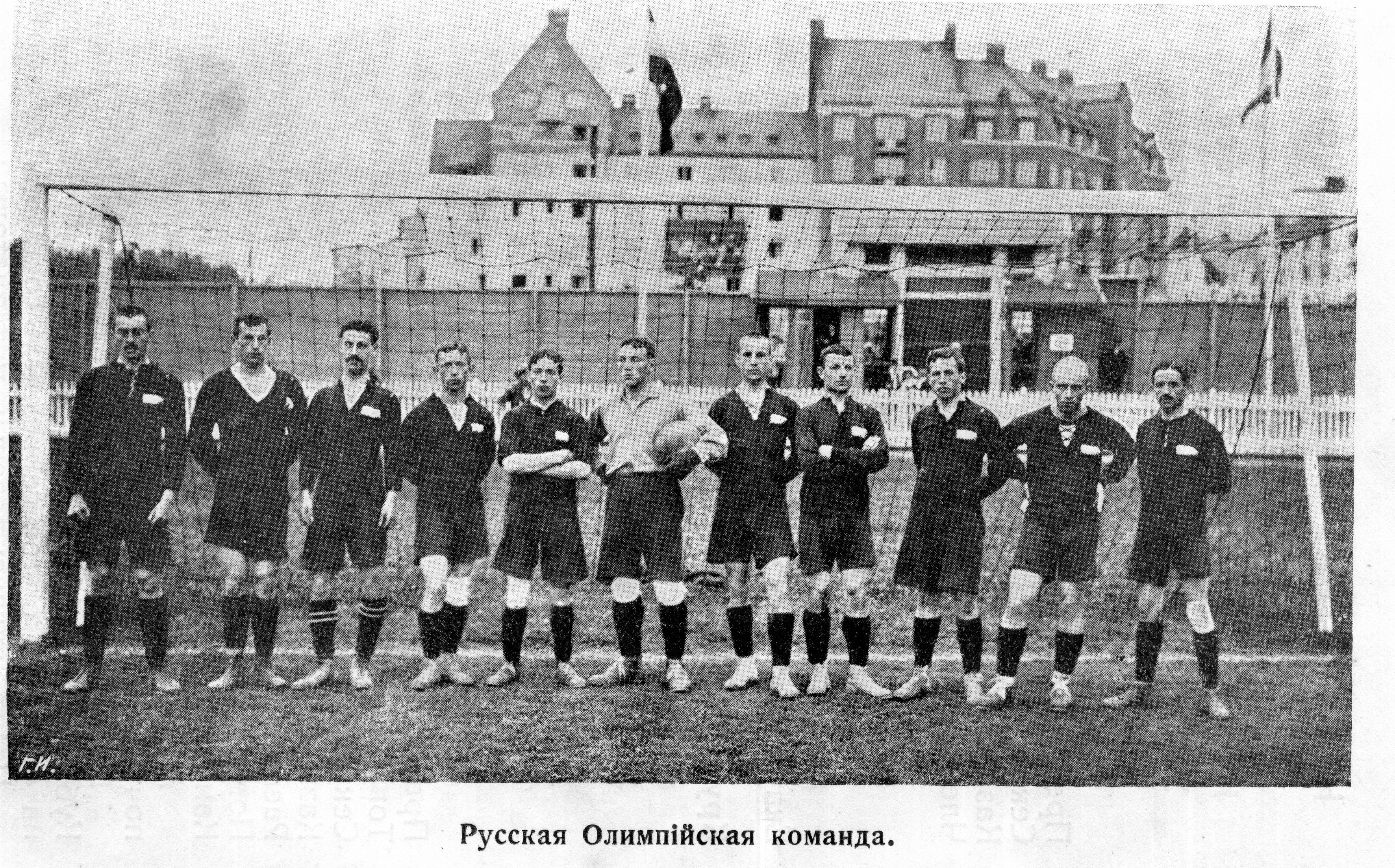 Олимпийская сборная Российской Империи по футболу